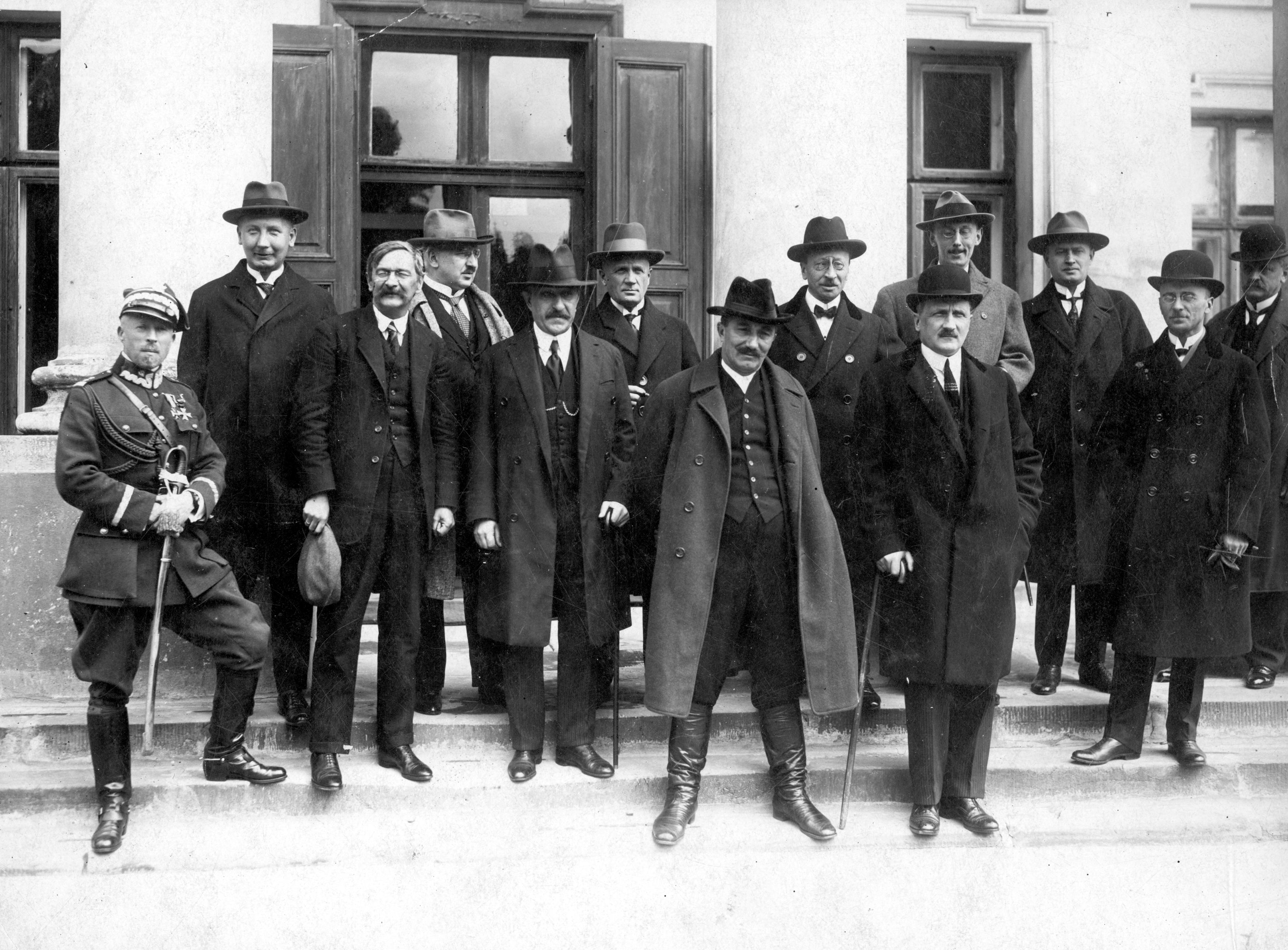 Rząd Wincentego Witosa 10.05.1926 ( Polish Government under Prime Minister Wincenty Witos 1926. Premier Wincenty Witos (stoi na najniższym stopniu, drugi z prawej). Obok Wincentego Witosa stoi minister skarbu Jerzy Zdziechowski(z laską). Wyżej od lewej stoją: minister spraw wojskowych Juliusz Malczewski, minister komunikacji Adam Chądzyński, minister wyznań religijnych i oświecenia publicznego Stanisław Grabski, minister sprawiedliwości Stefan Piechocki, minister spraw wewnętrznych Stefan Smólski, minister przemysłu i handlu Stanisław Osiecki, minister rolnictwa Władysław Kiernik, kierownik Ministerstwa Spraw Zagranicznych Kajetan Dzierżykraj-Morawski, minister reform rolnych Józef Radwan, minister pracy i opieki społecznej Jan Stanisław Jankowski, kierownik Ministerstwa Robót Publicznych Mieczysław Rybczyński.